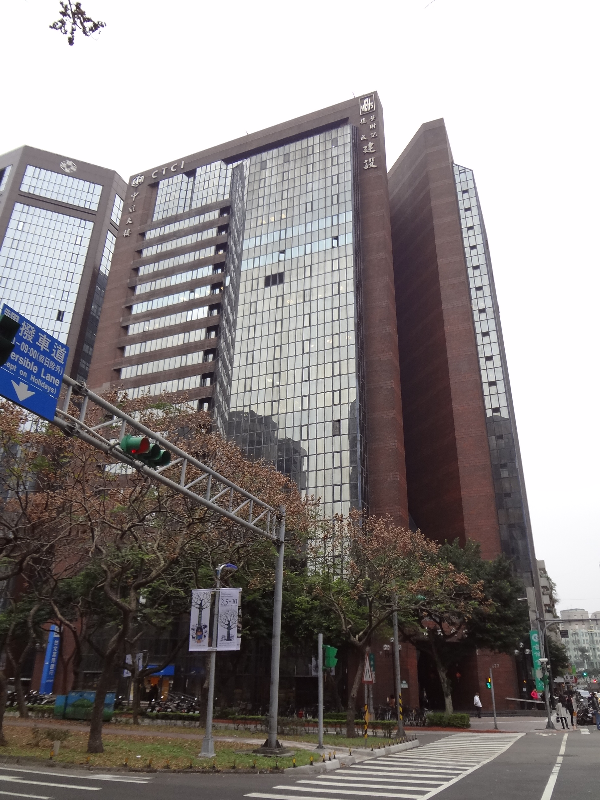 中鼎大樓，原中鼎工程總部，葉財記建設與德成建設合建，位於臺北市大安區敦化南路二段77號。永慶房屋總部位於12樓。